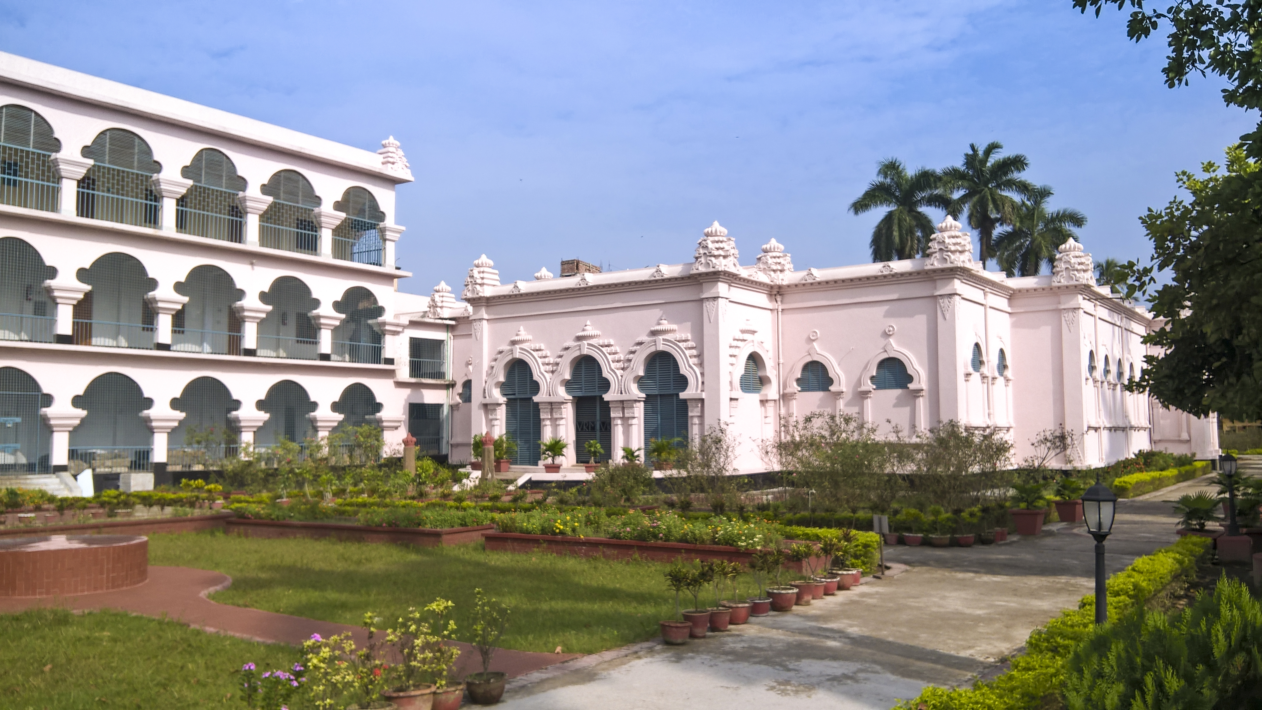 বরেন্দ্র গবেষণা জাদুঘর